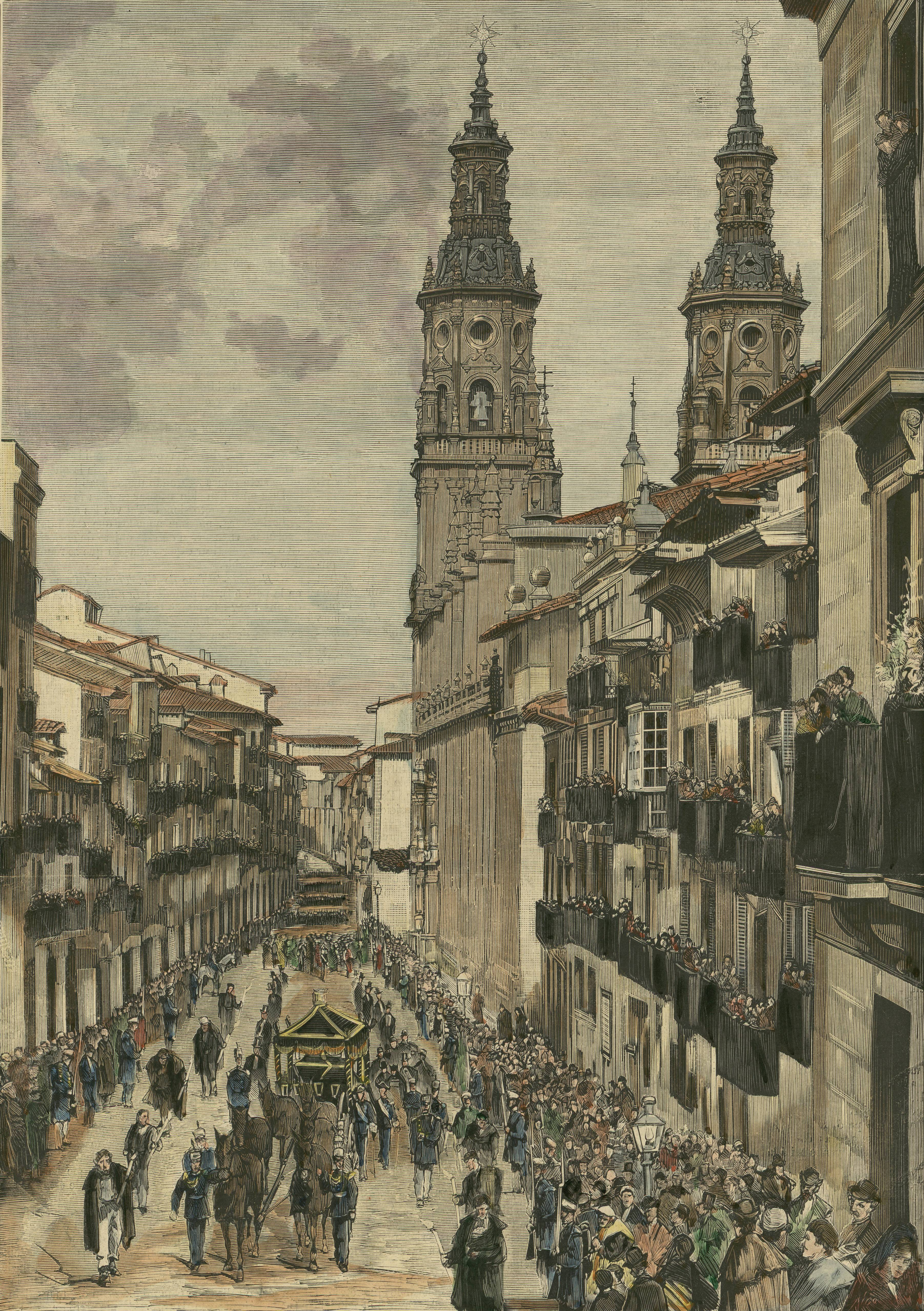 Logroño : paso del entierro del General Espartero por la calle del Mercado [Material gráfico] / dibujo del natural, por nuestro especial artista Sr. Muñoz.